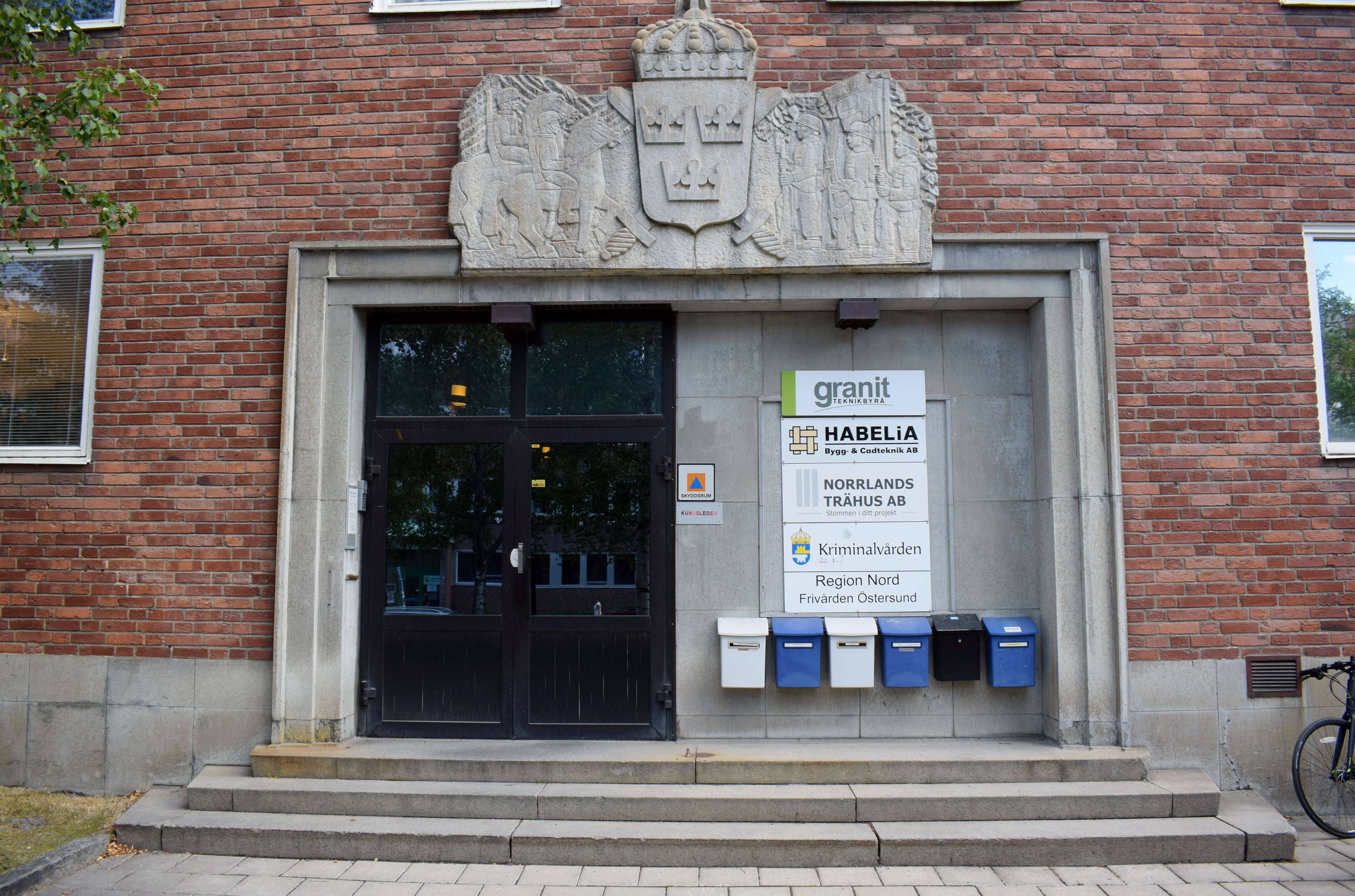 Entréparti till den före detta stabsbyggnaden för Nedre Norrlands militärområdesstab på Kyrkgatan 53. Byggnaden uppfördes åren 1944-1945.